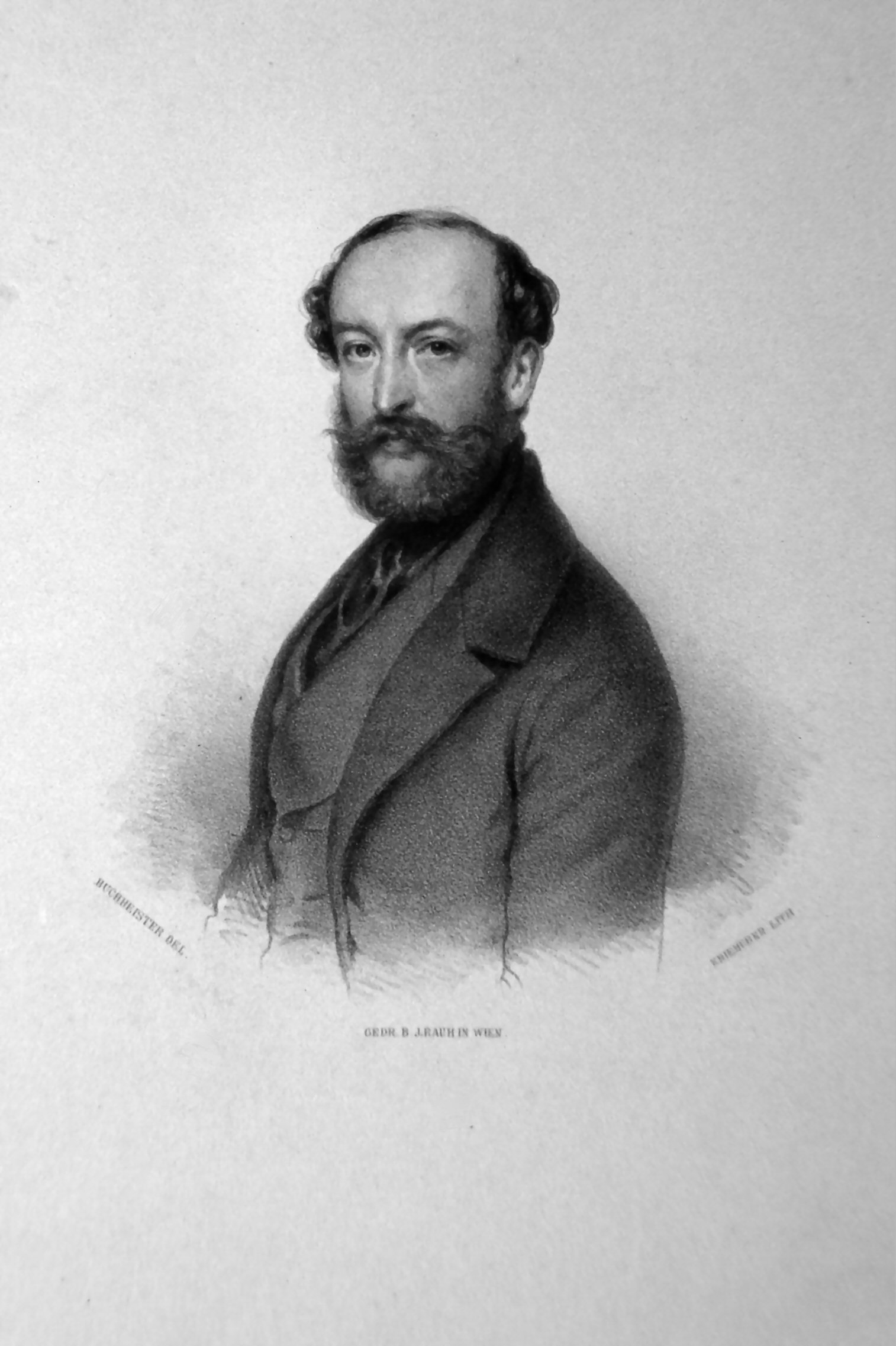 Rudolf Graf Apponyi (1812-1876), österreichiach-ungarischer Diplomat. Lithographie von Josef Kriehuber, nach einer Zeichnung von Buchheister, ca 1860.